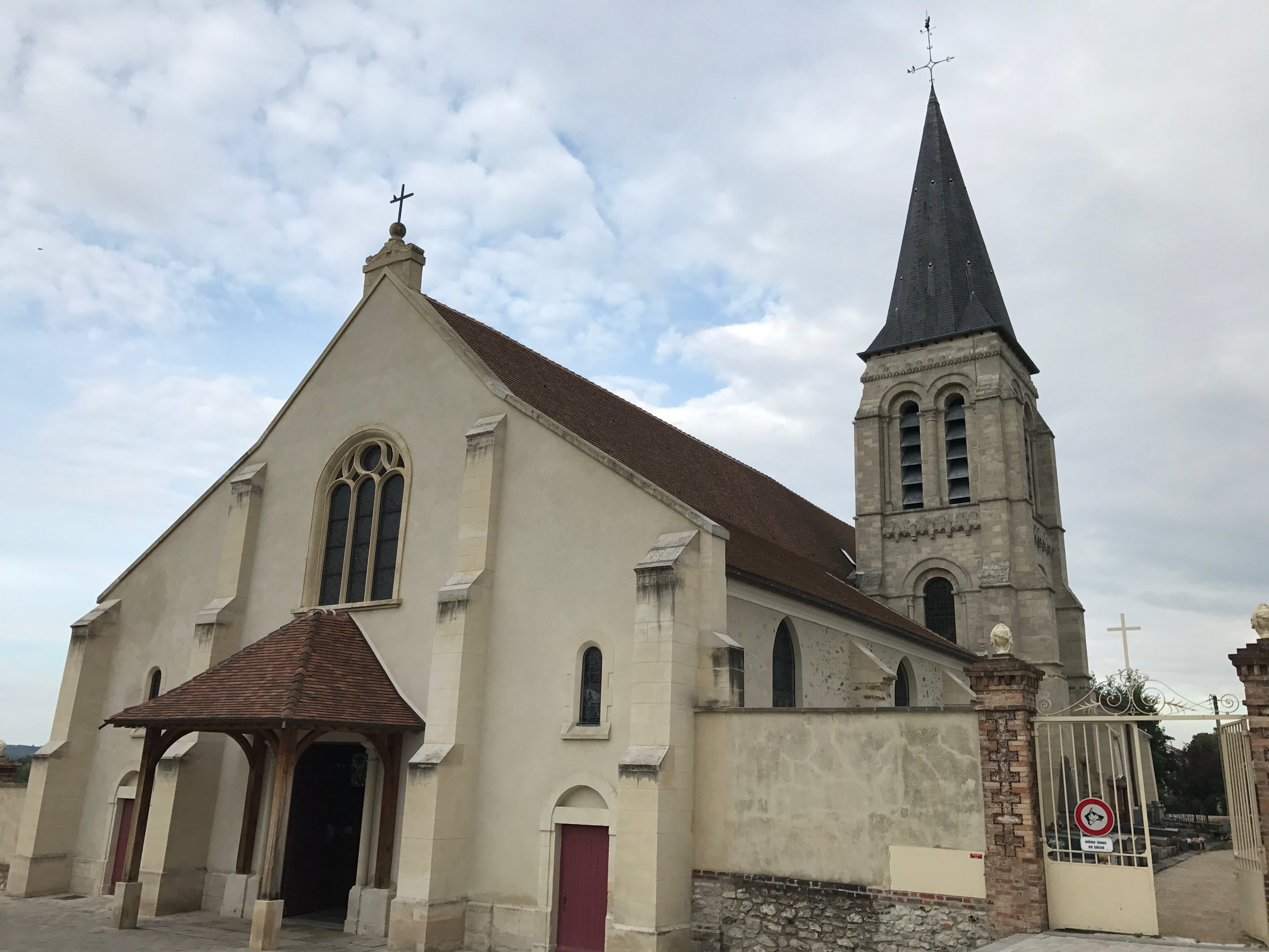 Église Saint-Sulpice-et-Notre-Dame à Noisy-le-Grand.